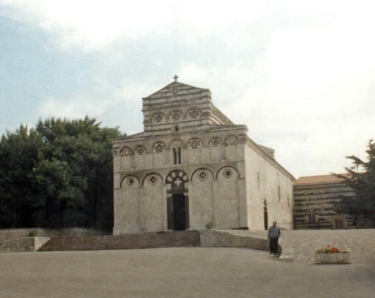 Abazia di San Pietro di Sorres (XII secolo), Borutta (SS), Sardegna